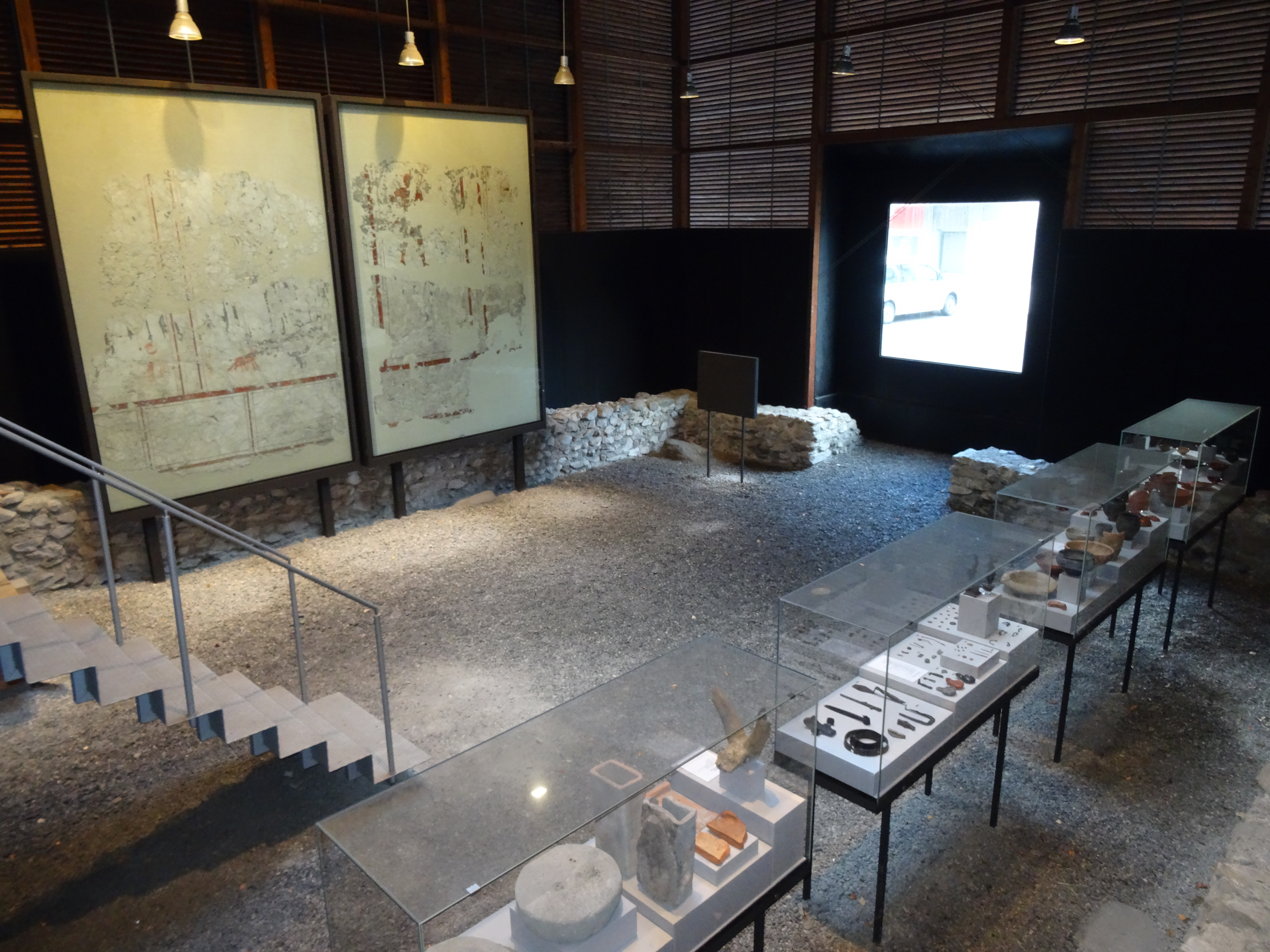 Ausstellung im Schutzbau über der archäologischer Fundstelle im Welschdörfli in Chur